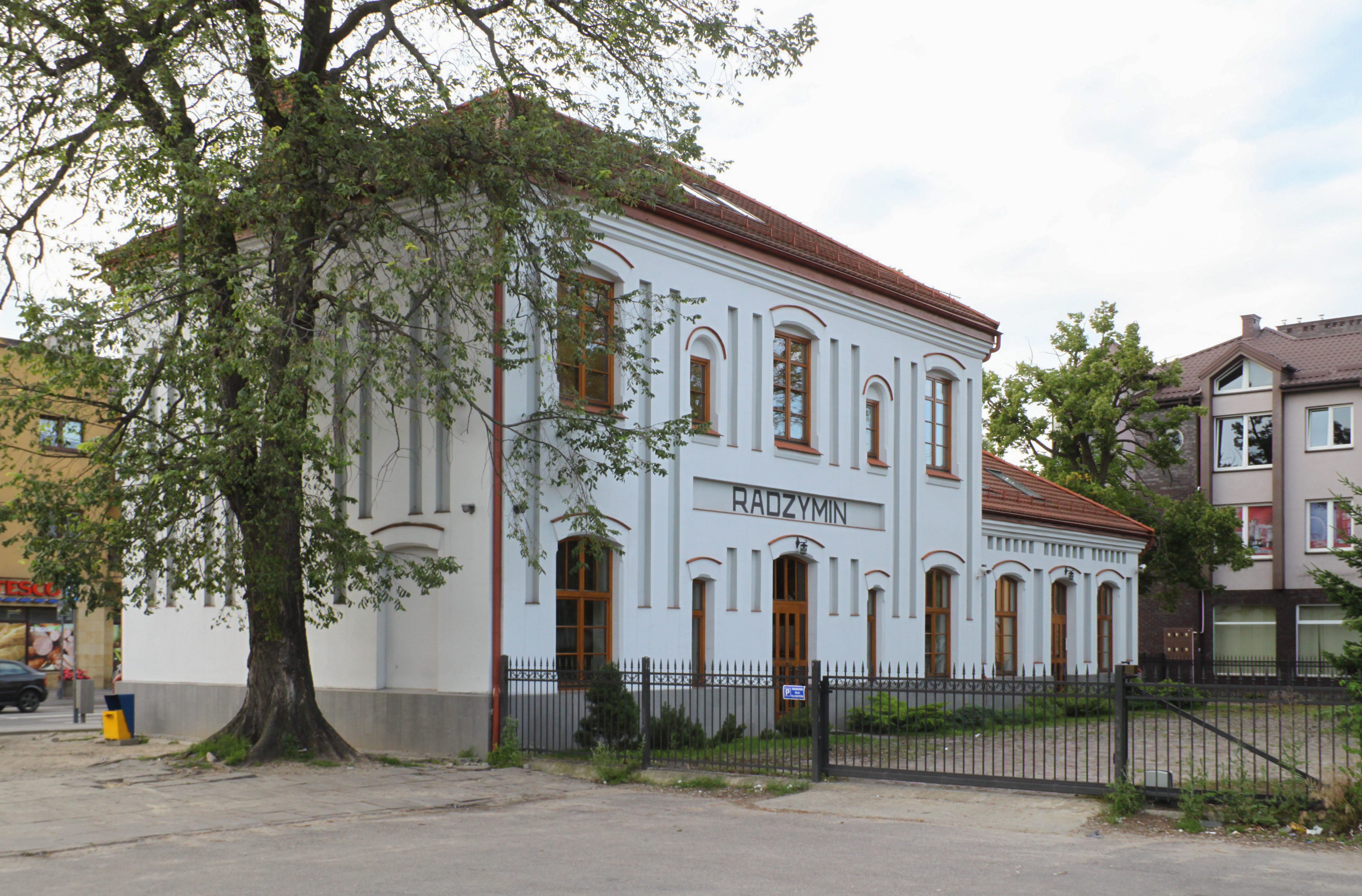 Budynek dawnej stacji na wąskotorowej linii Mareckiej Kolei Dojazdowej